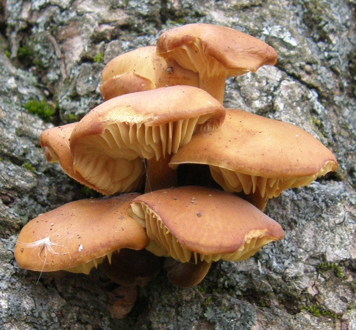 A fotó Magyarországon, Somogy megyében, Nagyberényben készült.